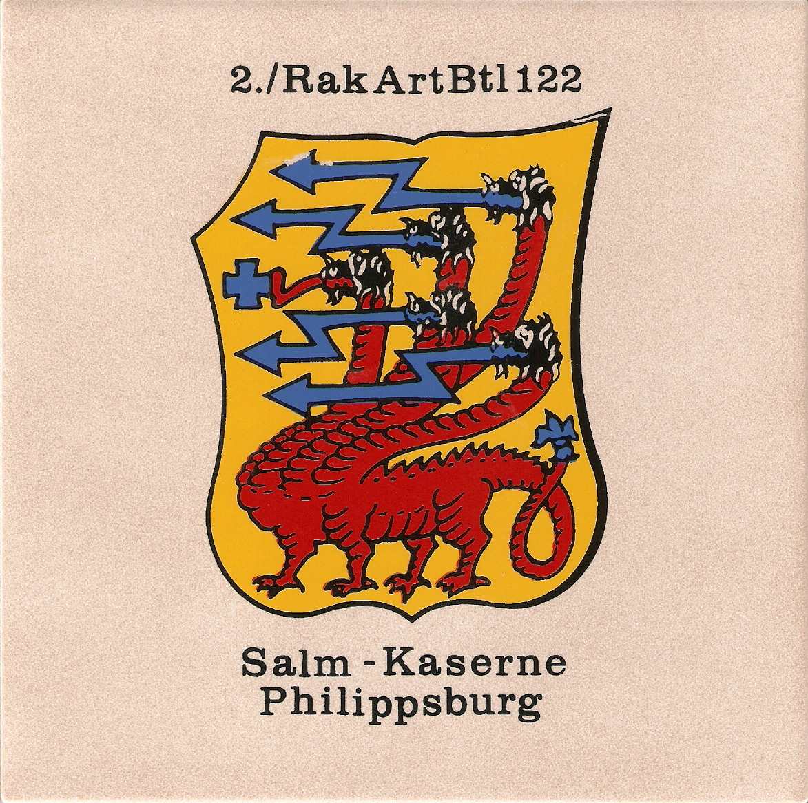 Kachel des 2. Raketenartilleriebataillon 122 in der Salm-Kaserne in Philippsburg